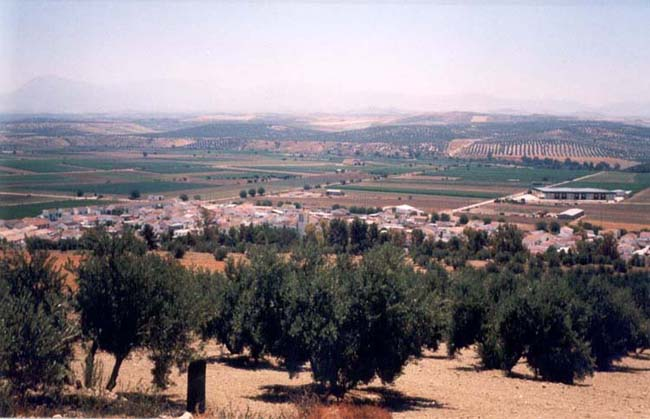 Panorámica de Campillo del Río